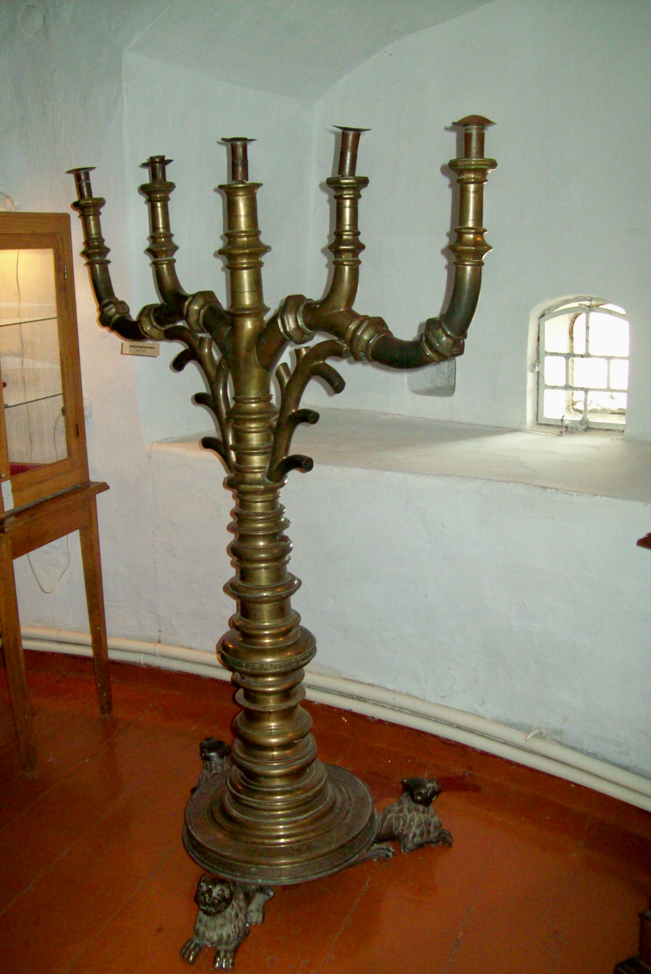 Знято фотоапаратом Kodak